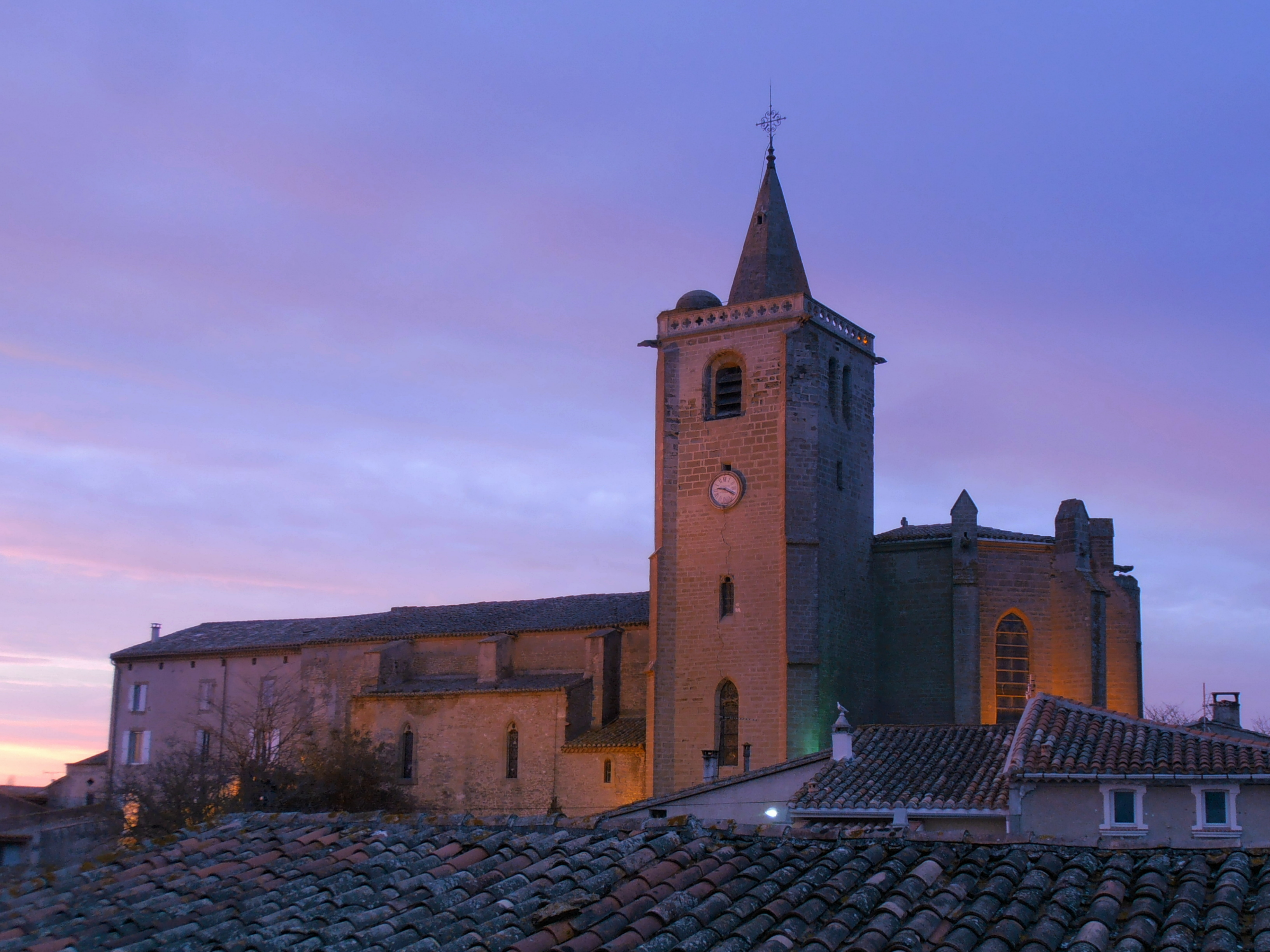 L'église de Pexiora, édifiée au XIVe siècle.